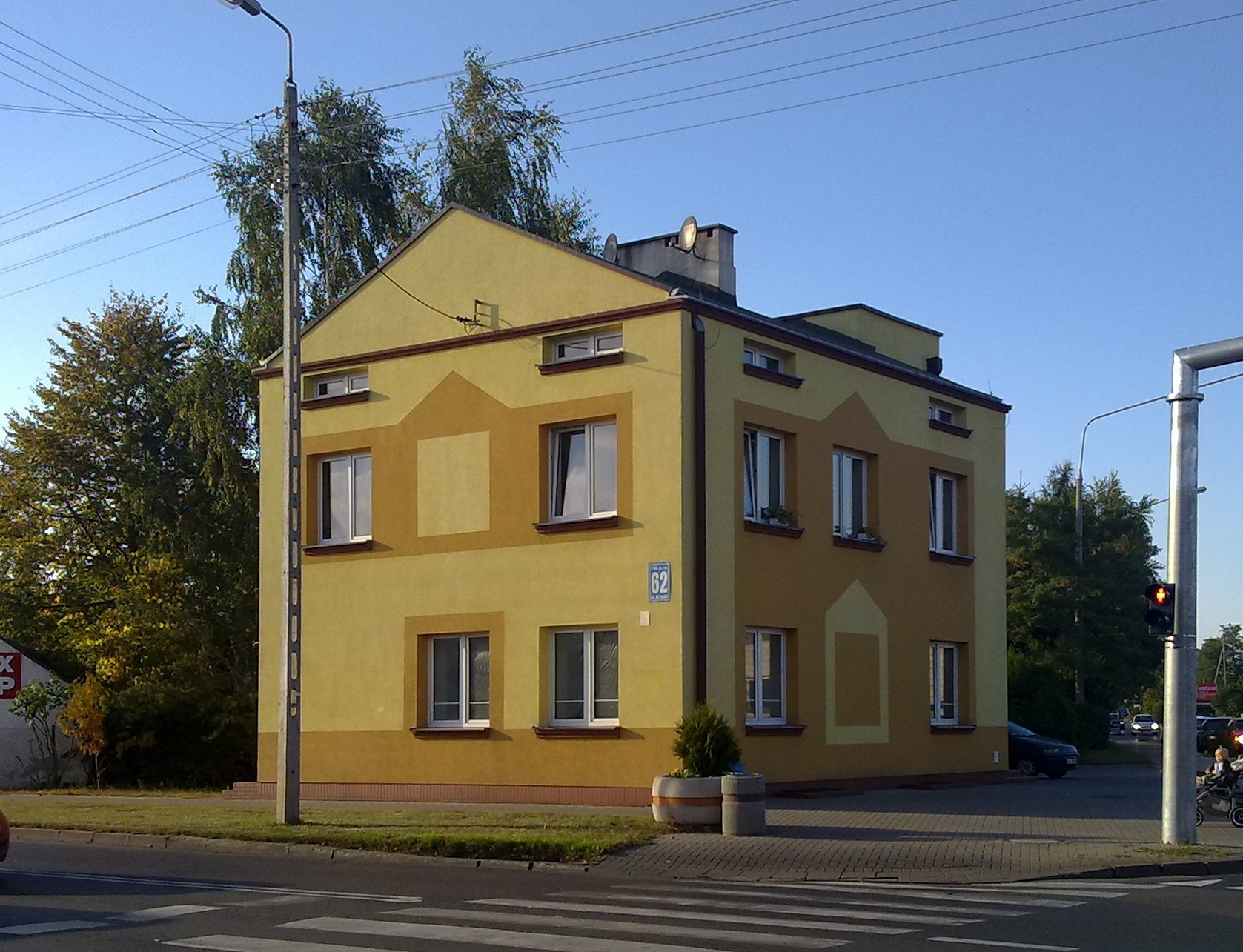 Biała Podlaska. Budynek na rogu ulic Brzeskiej i Jana Pawła II, dawna stacja „Biała Podlaska Miasto Wąsk.”